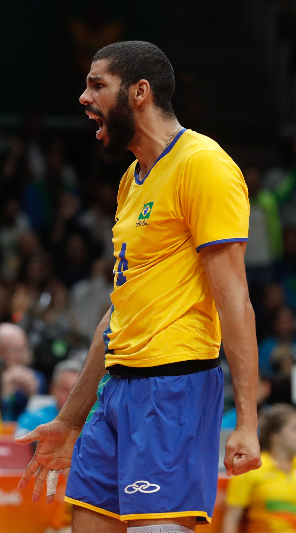 Rio de Janeiro - Seleção brasileira masculina de vôlei vence a da França por 3 sets a 1 no Maracanãzinho e vai às quartas-de-final (Fernando Frazão/Agência Brasil)